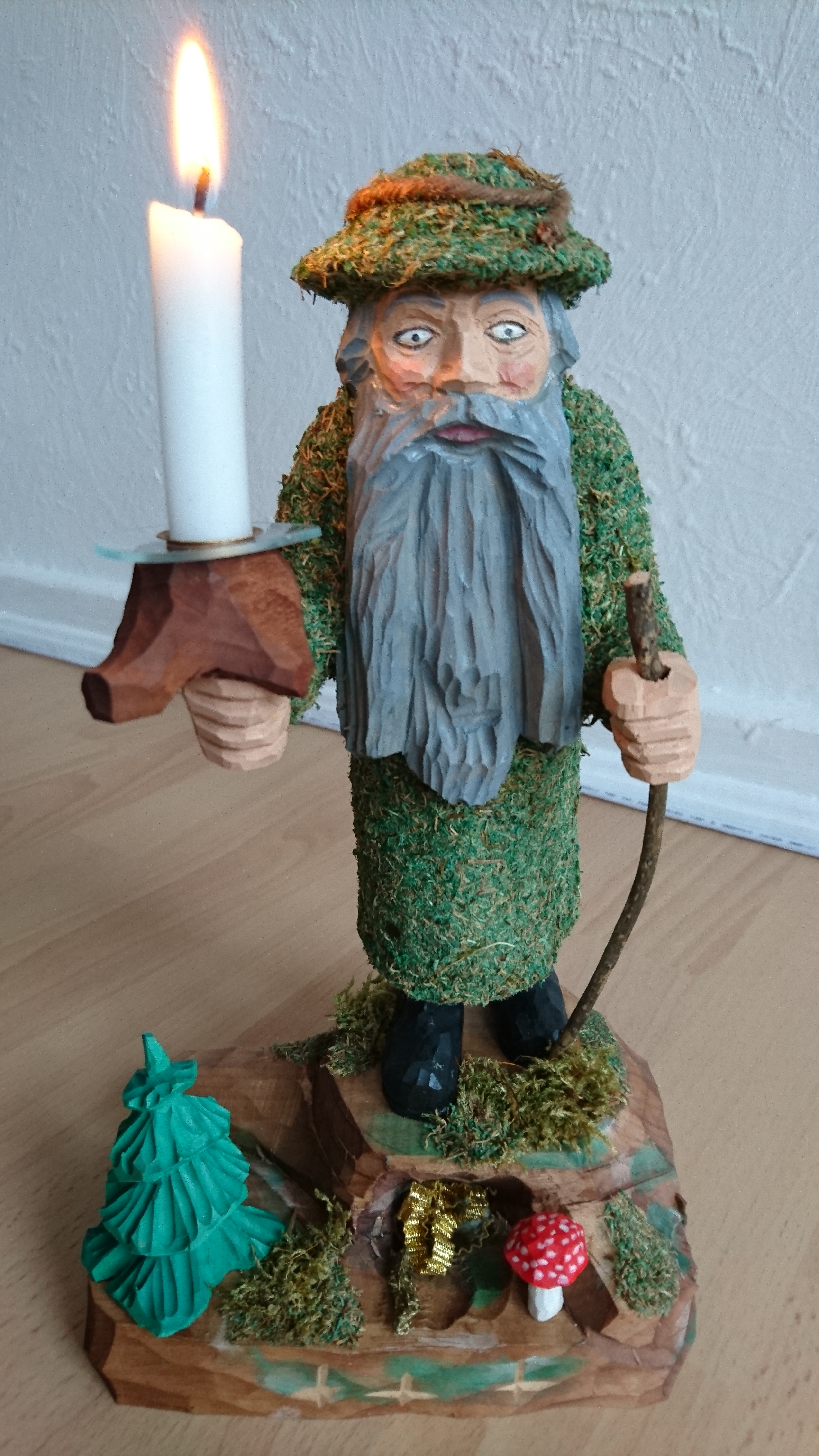 Ottmar Heckel, Vogtland, um 1995